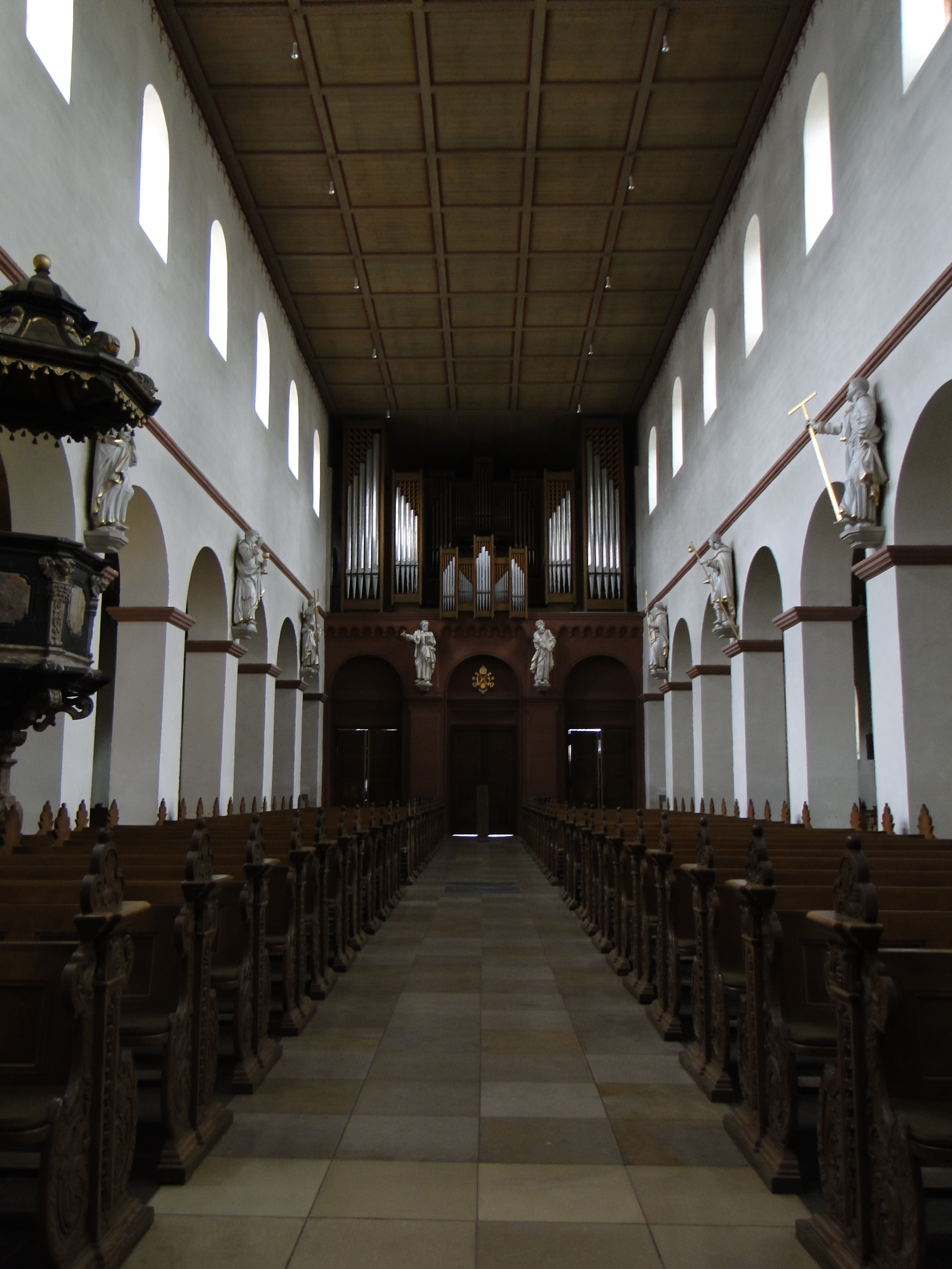 Wilbrand Orgel